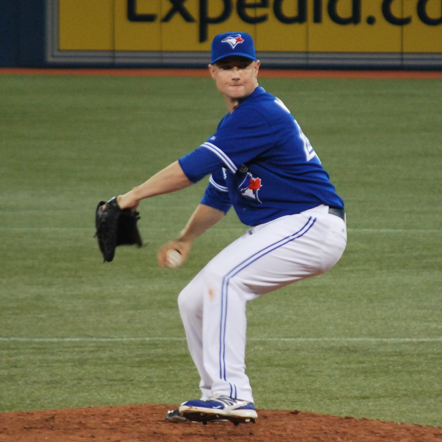 Neil Wagner